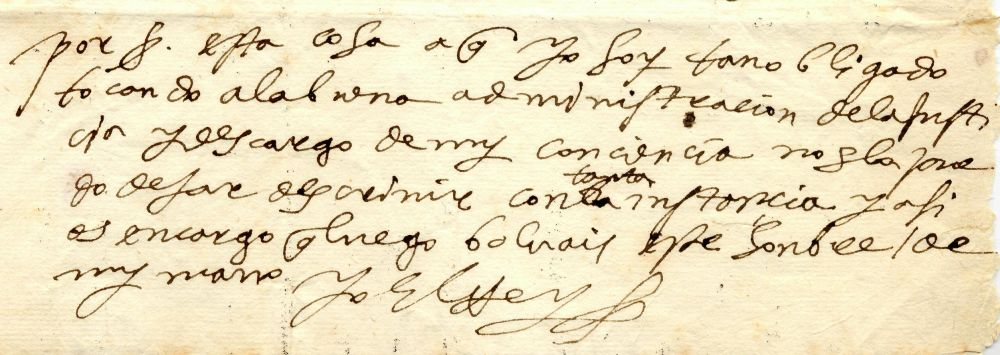 Letra y firma de Felipe II de España